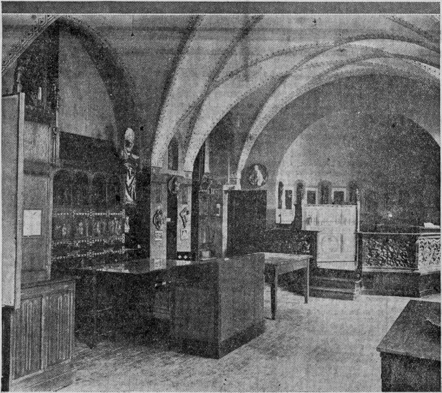 HET STEDELIJK DR. CUYPERS-LUYTEN MUSEUM TE ROERMOND is heden door H.K.H. Prinses Juliana officieel geopend. – Een interieur van het nieuwe museum. Uit De Tijd, jaargang 87, nr. 26548 (dinsdag 23 augustus 1932): [p. 4].